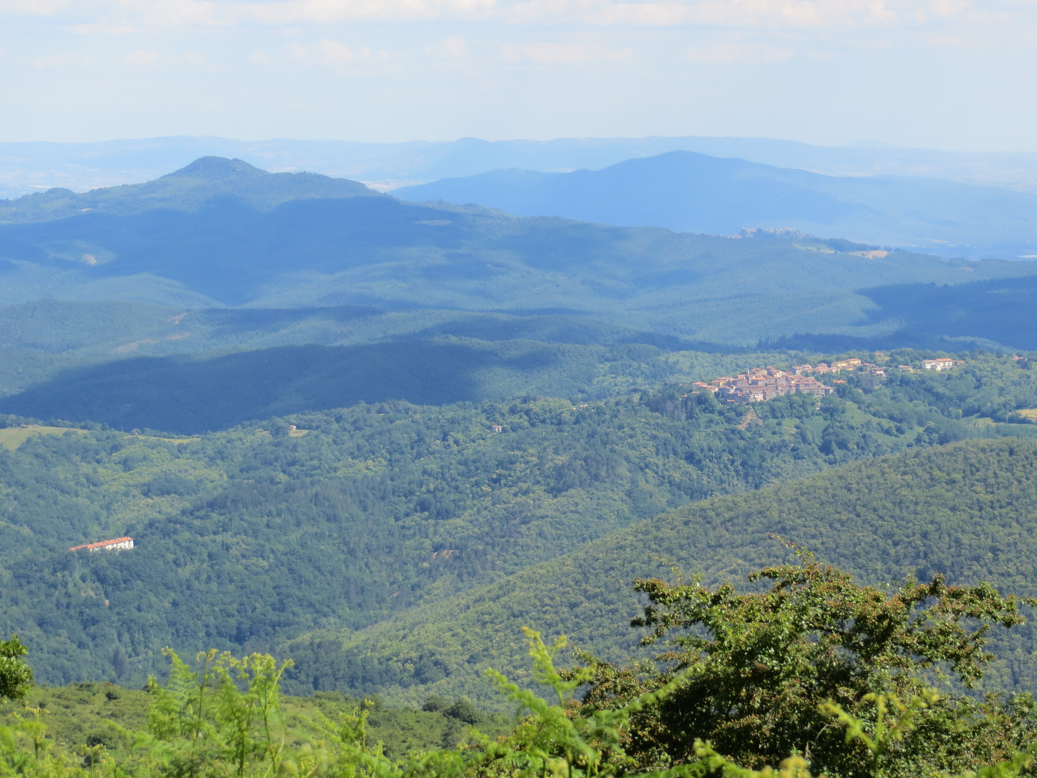 Boccheggiano visto dal Poggio di Montieri. Sullo sfondo Roccatederighi e, a sinistra, il Sassoforte